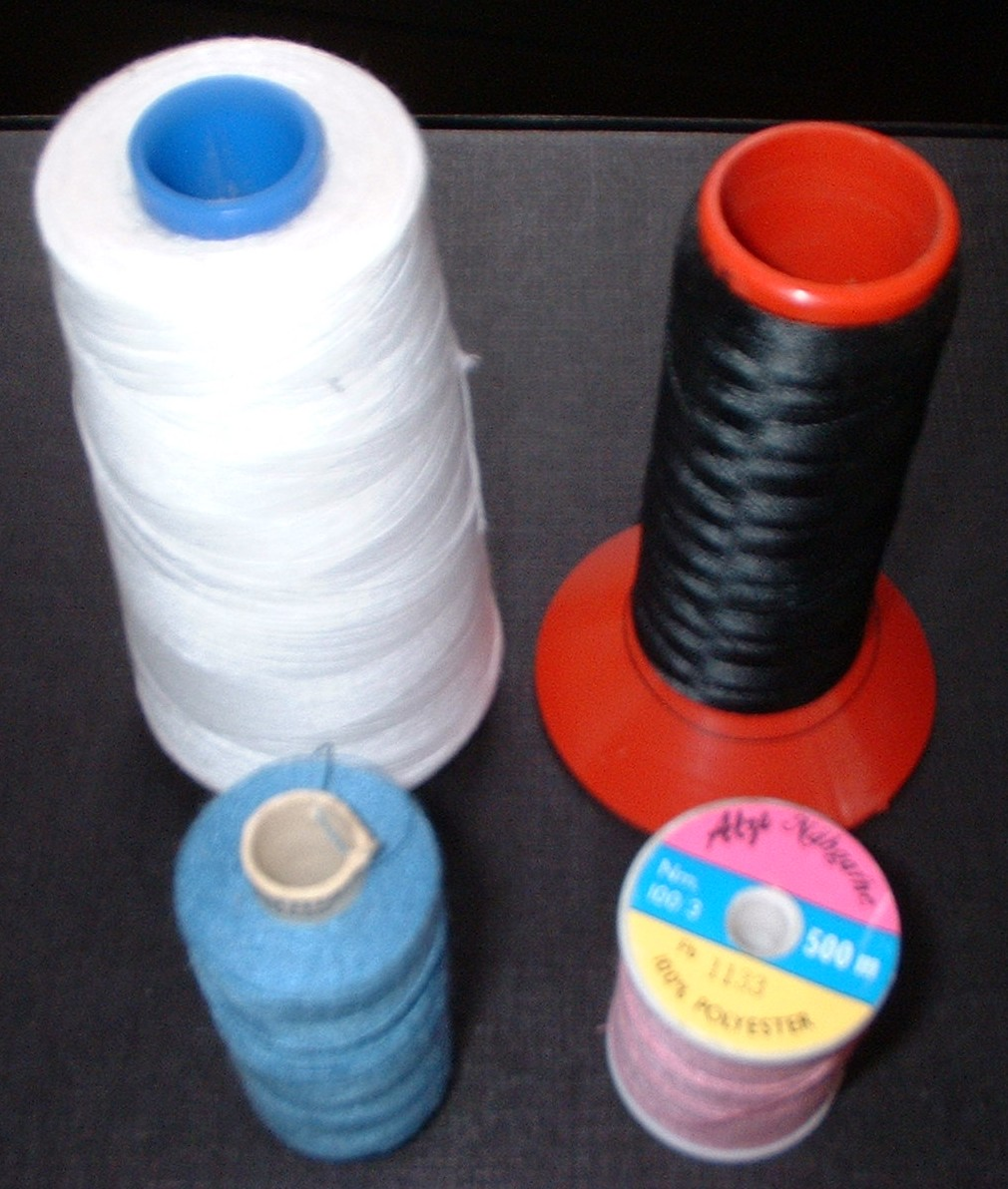 Nähgarnspulen